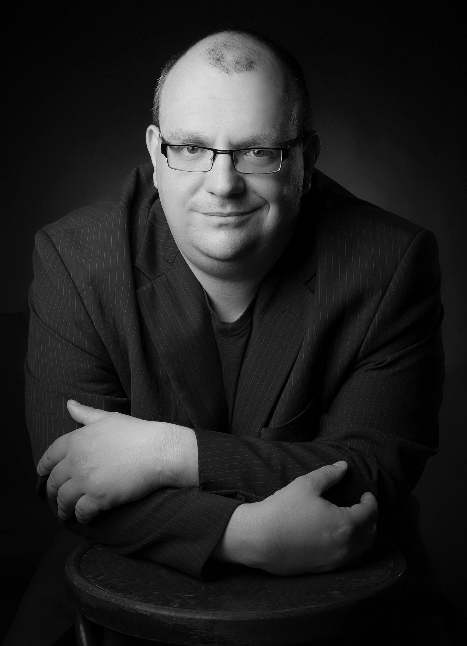 Michael Schreckenberg